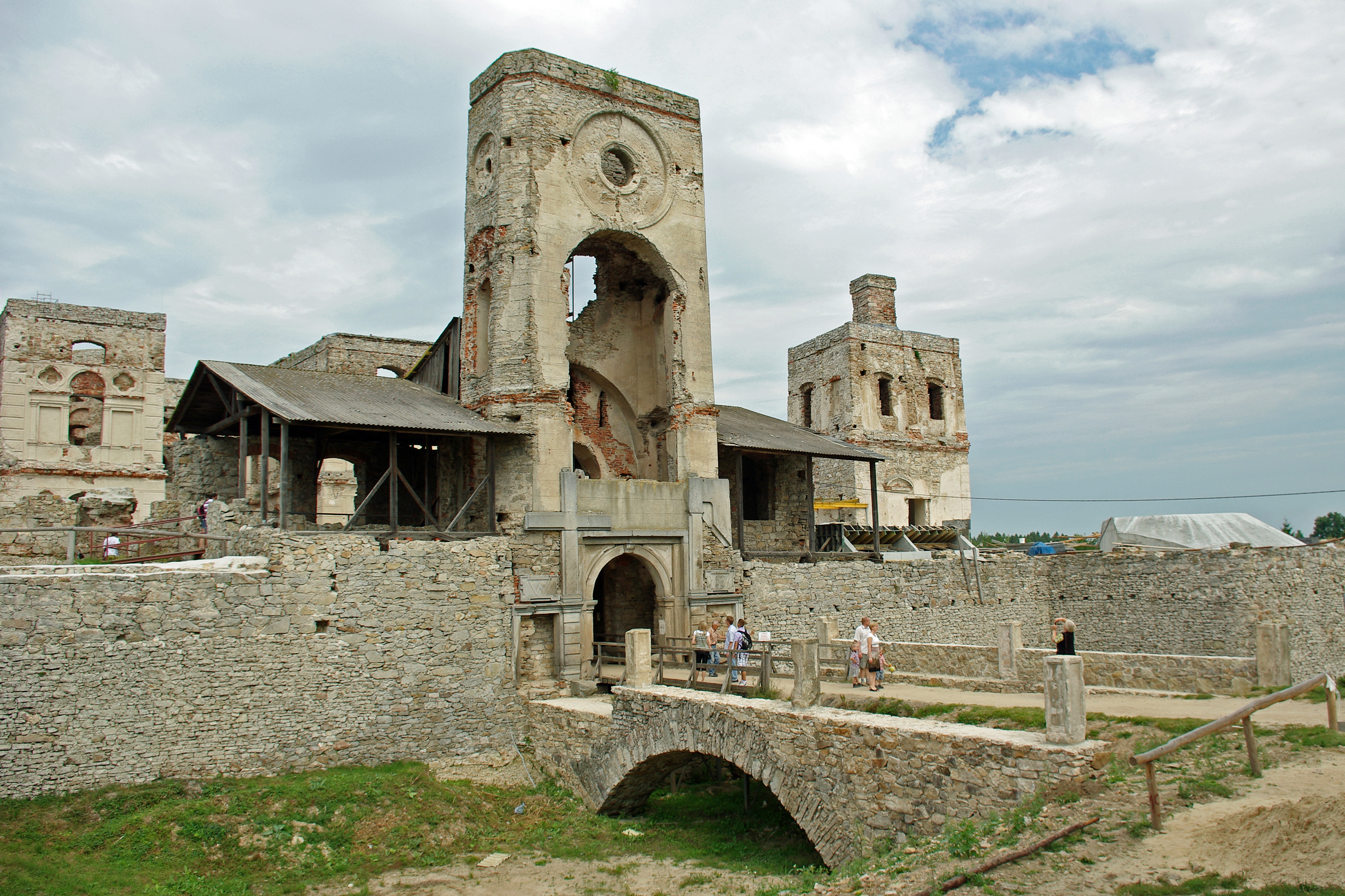 Ujazd, zamek (pałac) Krzyżtopór